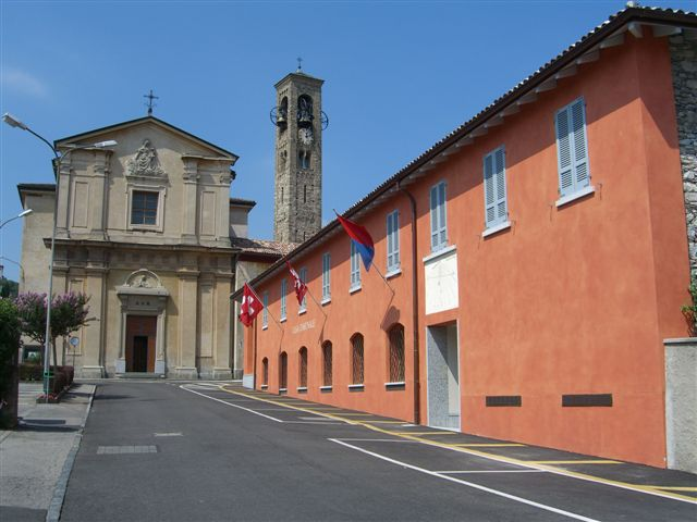 Novazzano.